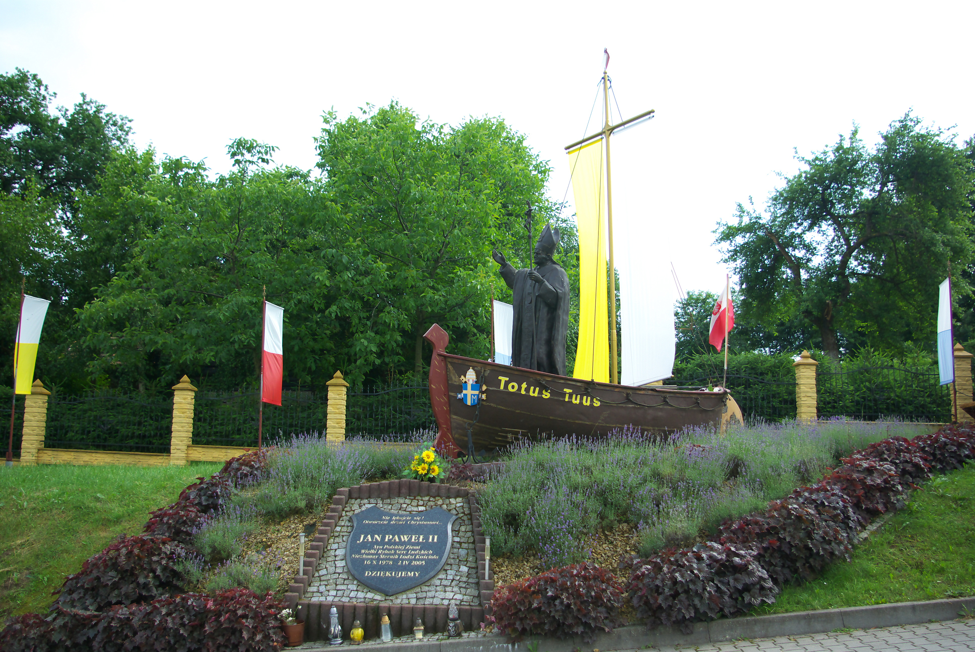 Pomnik Jana Pawła II przy kościele Wniebowzięcia Najświętszej Maryi Panny w Trepczy